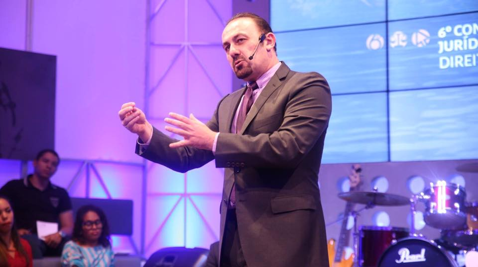 Adel El Tasse no 6º Congresso Jurídico Online do CERS